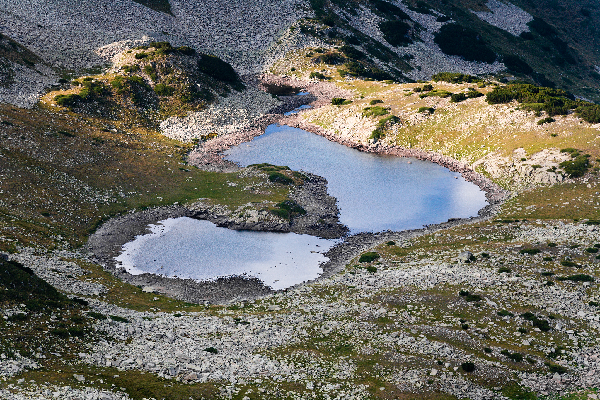 Пирин, Пирин, Горното Типицко езеро